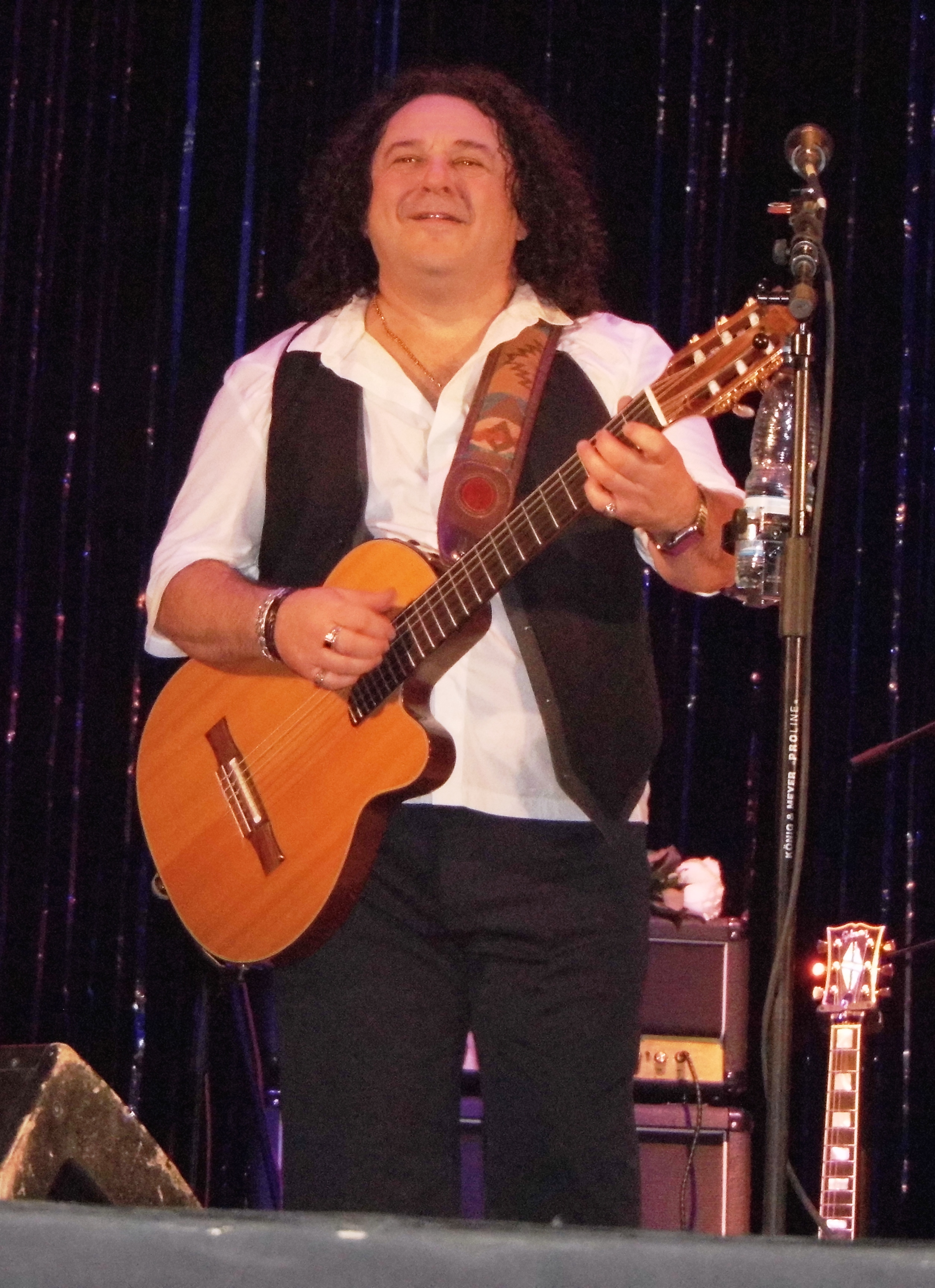 Игорь Саруханов на концерте в Рязани 20 ноября 2015 года